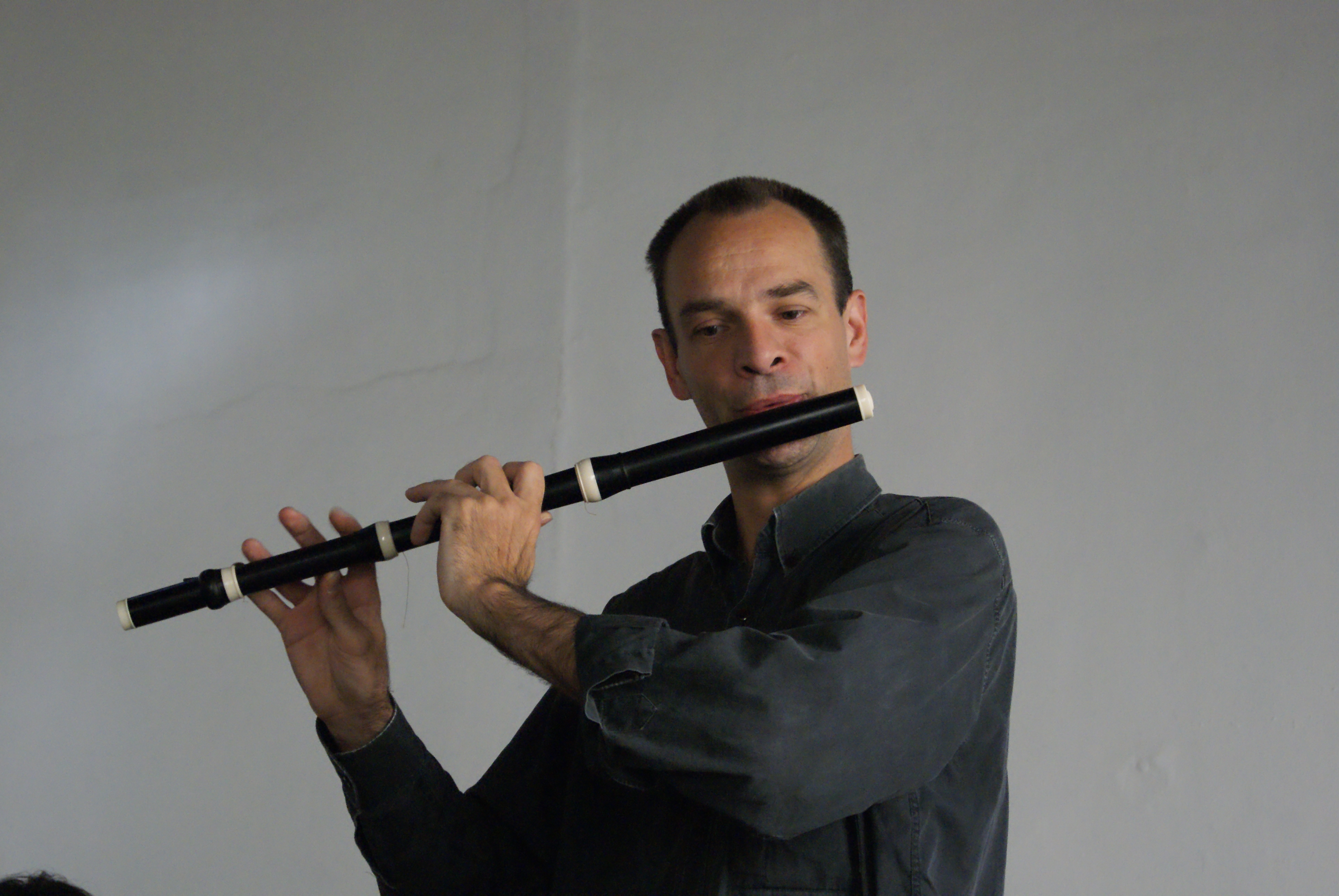 Ensamble Clérambault en el Festival Pasión, en el Templo de Nuestra Señora del Carmen, Puebla, Pue. 2010. El ensamble está compuesto por la clavecinista mexicana Norma García y el flautista francés Vincent Touzet.